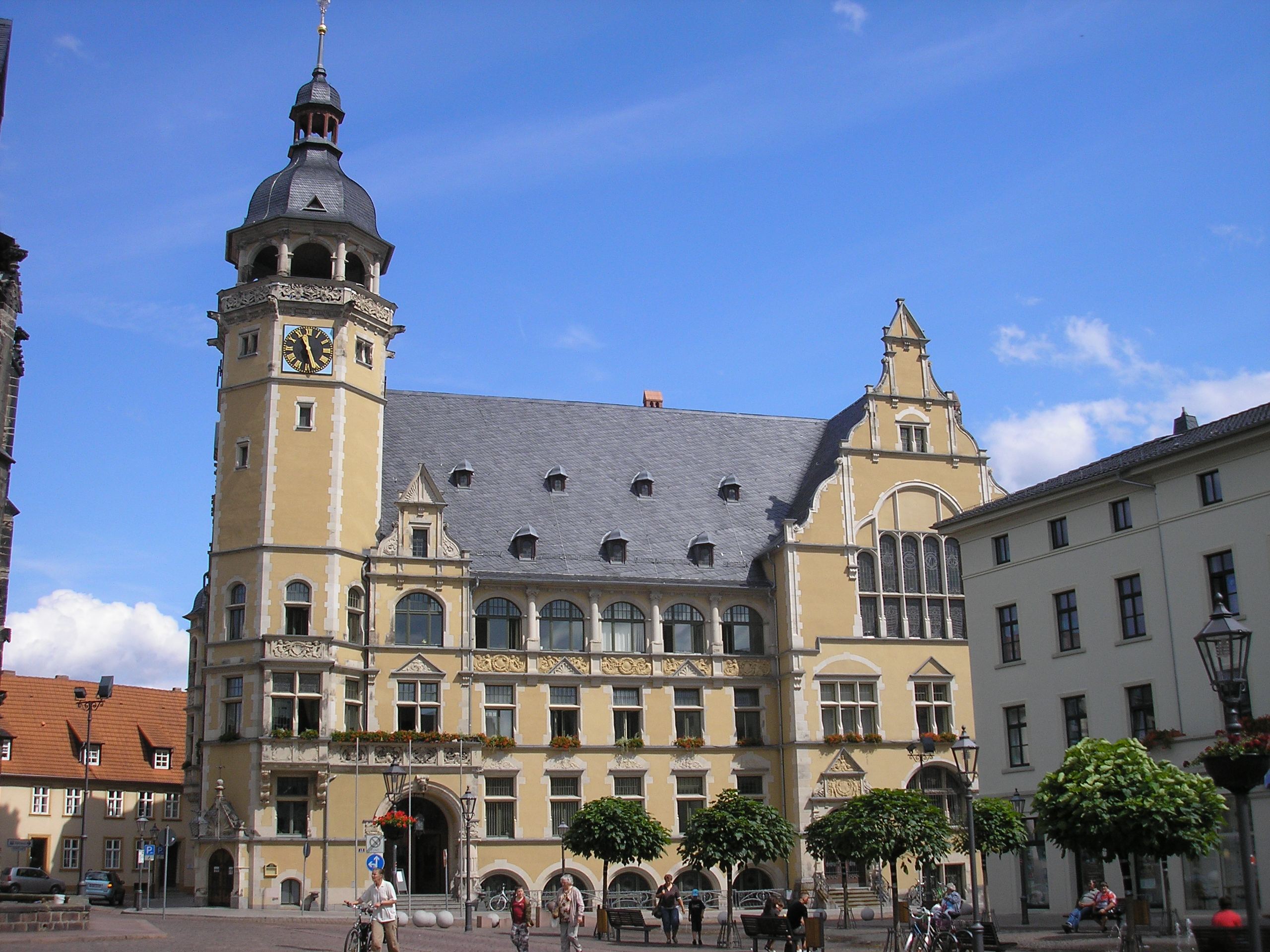 Das Rathaus in Köthen (Anhalt).